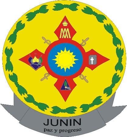 Escudo de armas del municipio de Junín en el departamento de Cundinamarca, Colombia